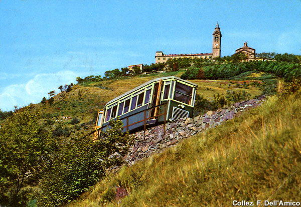 Guidovia della Madonna della Guardia, Genova